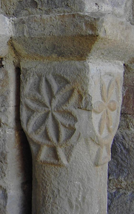 Una hexapétala en San Vicente de Labuerda.